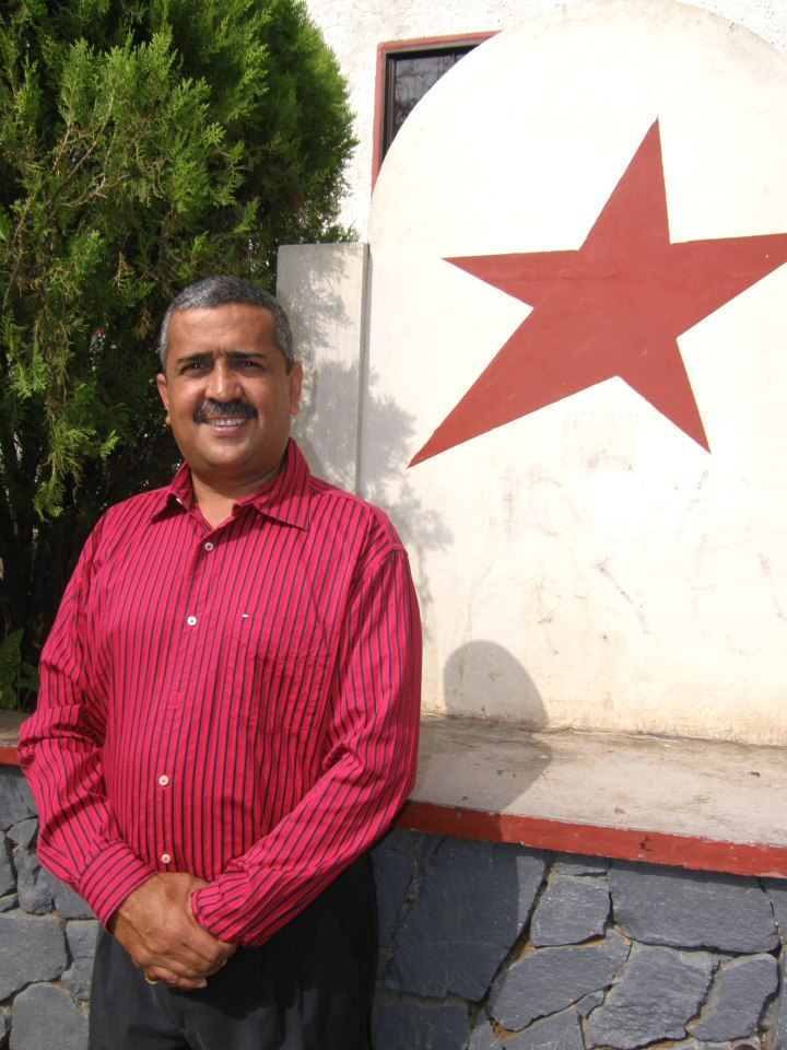 Domingo Mendoza Alcalde Municipal